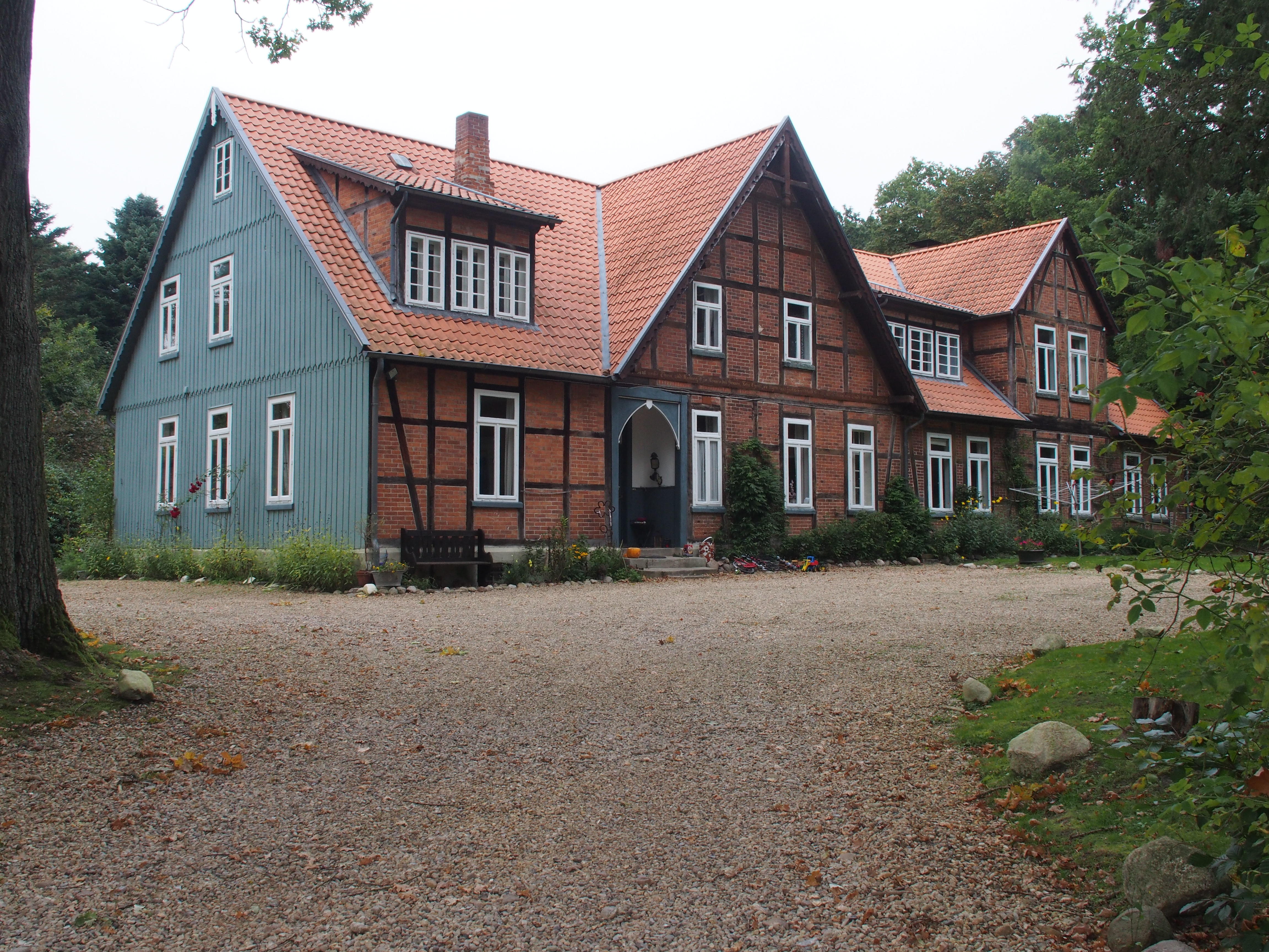 Fachwerkhaus in Eldingen Ortsteil Wohlenrode Nr. 5, Niedersachsen (Germany)